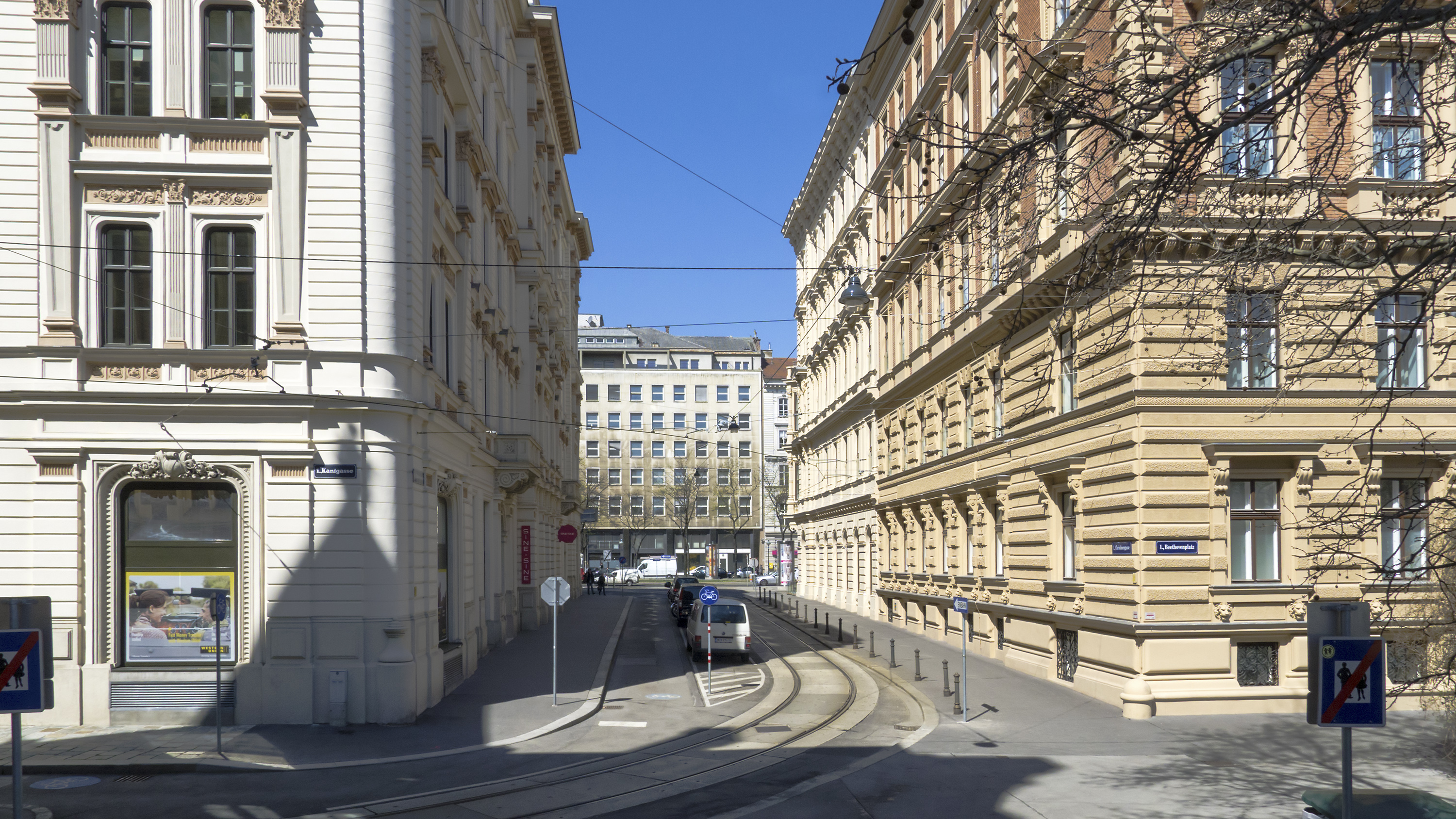 Christinengasse in Wien 1 bei der Kantgasse Richtung Nordwesten